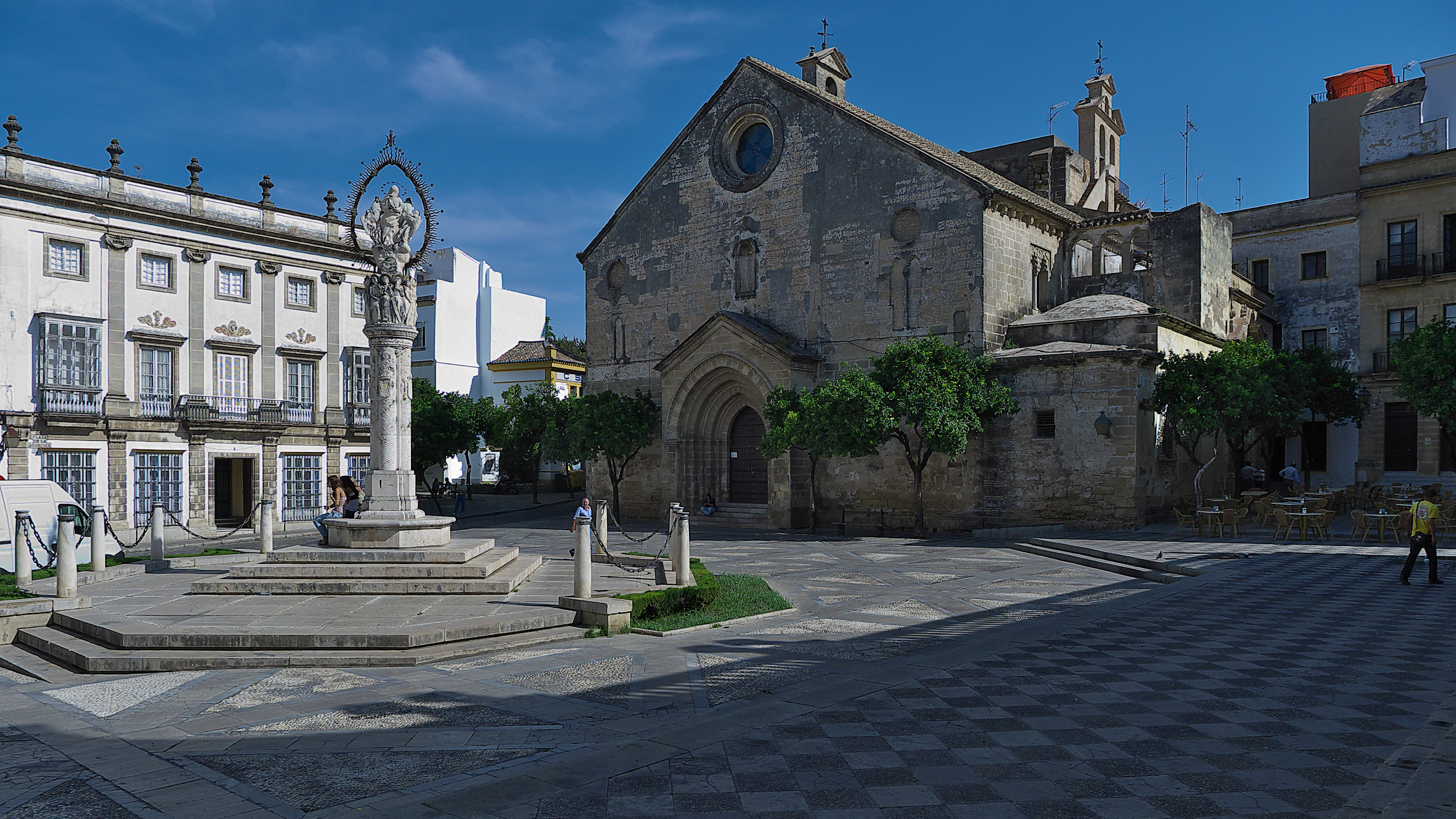 Posiblemente la más importante por su arquitectura. Presenta interesantes muestras del mudéjar, renacimiento y el neoclásico.